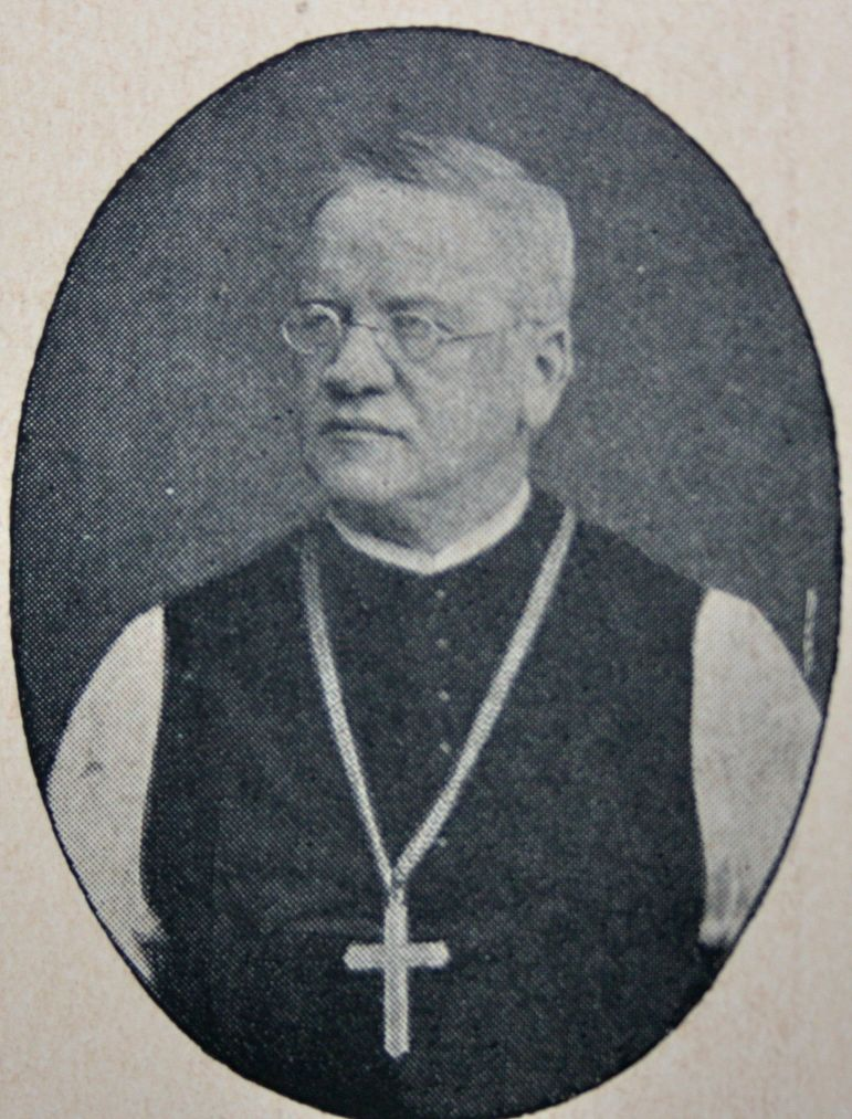 Theobald Anton Grasböck (* 16. September 1846 in Bad Leonfelden; † 27. September 1915 in Wilhering) war Zisterzienser und von 1892 bis 1915 Abt des Stifts Wilhering.